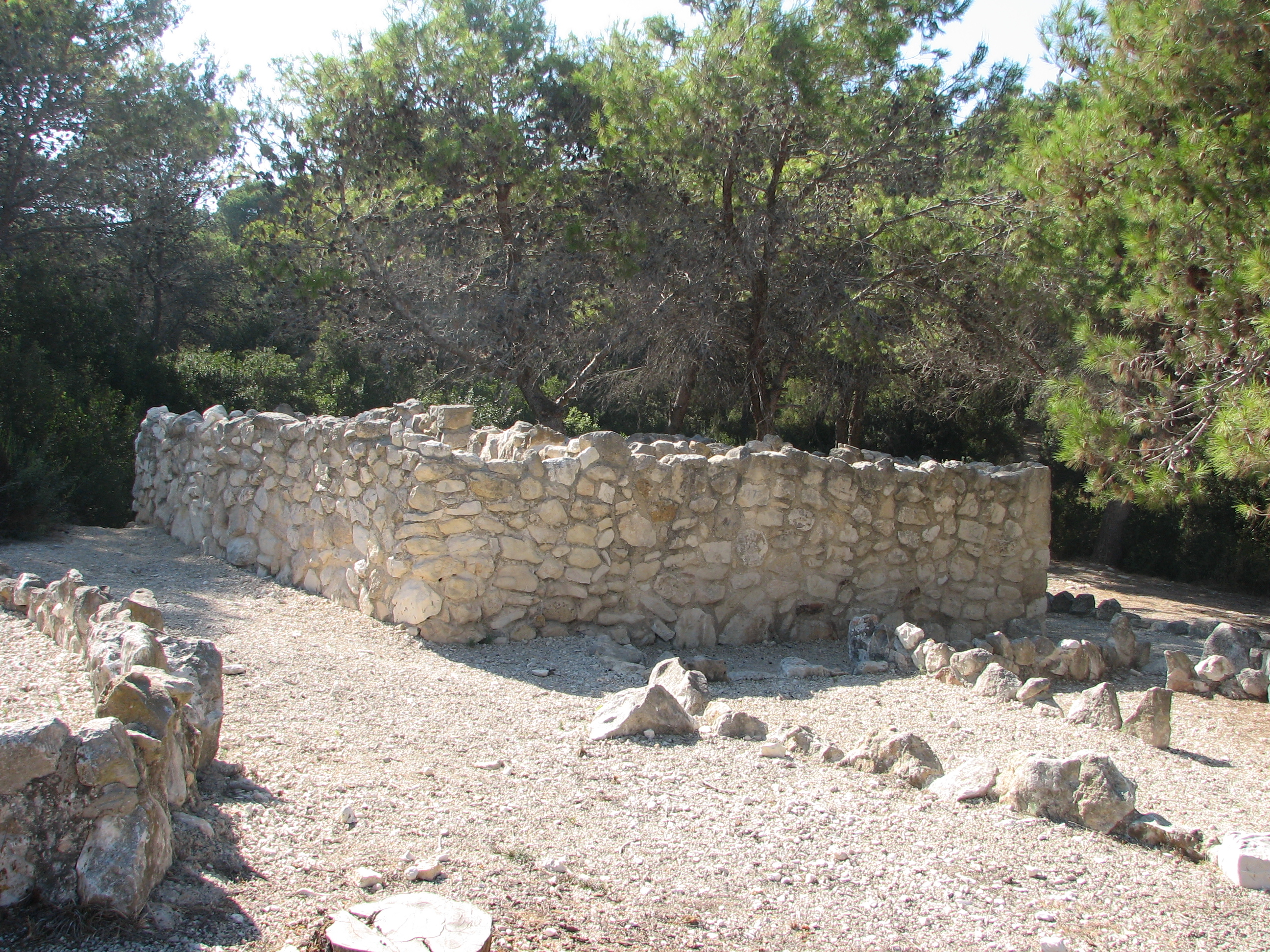 The Road of the Millennia - Archaeological Park, Hecht Museum, Haifa Israel דרך הדורות הוא פארק ארכאולוגי ליד אוניברסיטת חיפה, אליו הועברו מבנים ומתקנים ארכאולוגים שמקומות שנועדו להריסה Dwellings in the Agricultural Farm from Ramat Matred (Negev Highlands) Iron Age 1000-900 BCE מבני מגורים בתחום החווה החקלאית ברמת מטרד (הר הנגב) מתוארך לתקופת הברזל 900-1000 לפני הספירה. בתי המגורים היו צמודים לבית החווה והם כללו מבני מגורים קטנים ומתקני מלאכה. היום הם נמצאים בדרך הדורות ליד אוניברסיטת חיפה